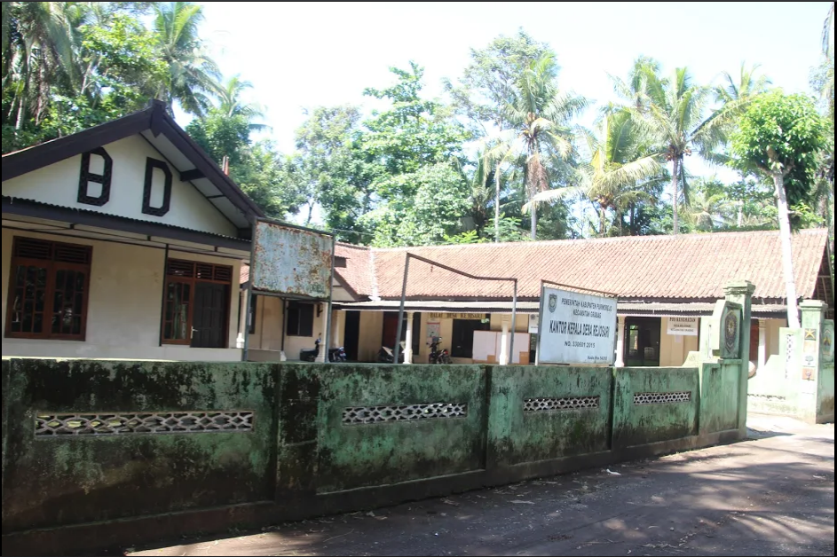 BALAI DESA REJOSARI